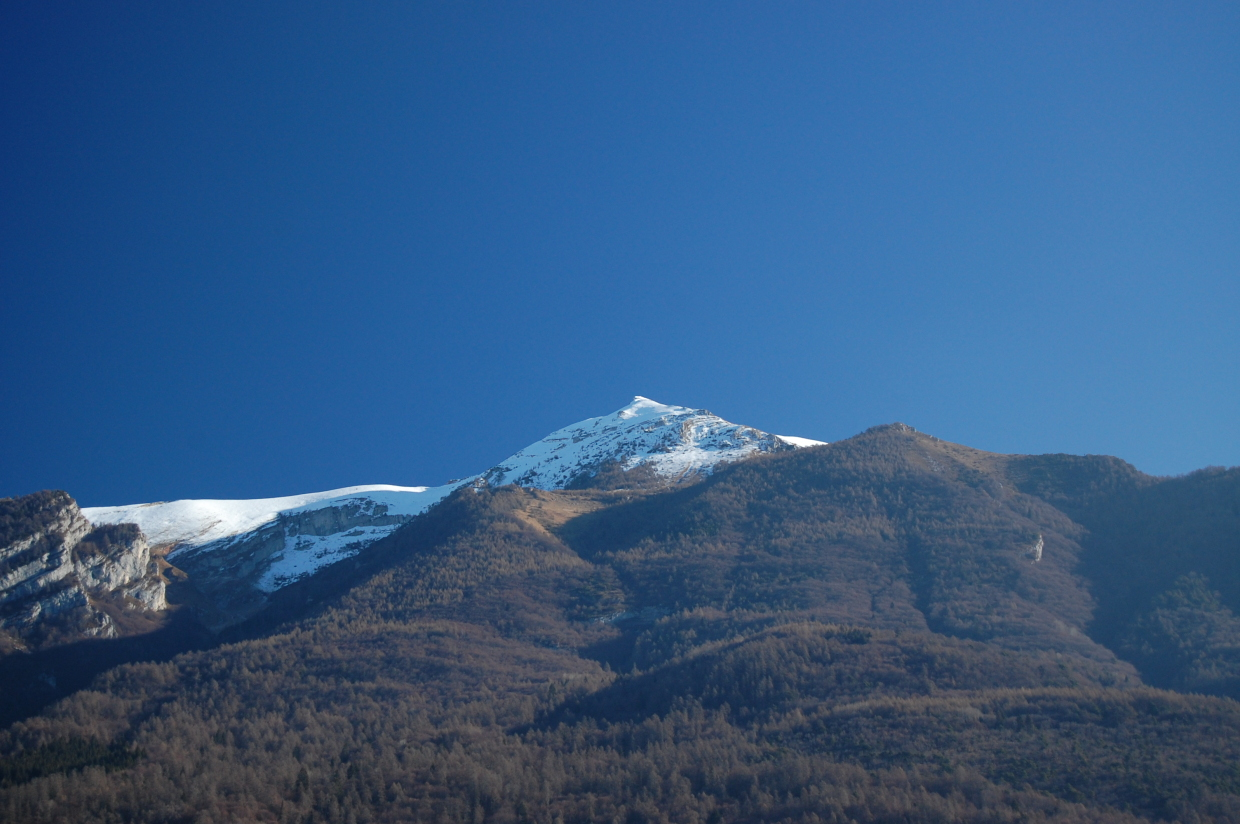 Monte Cornetto di Bondone visto dalla Valle di Cavedine (Italy)